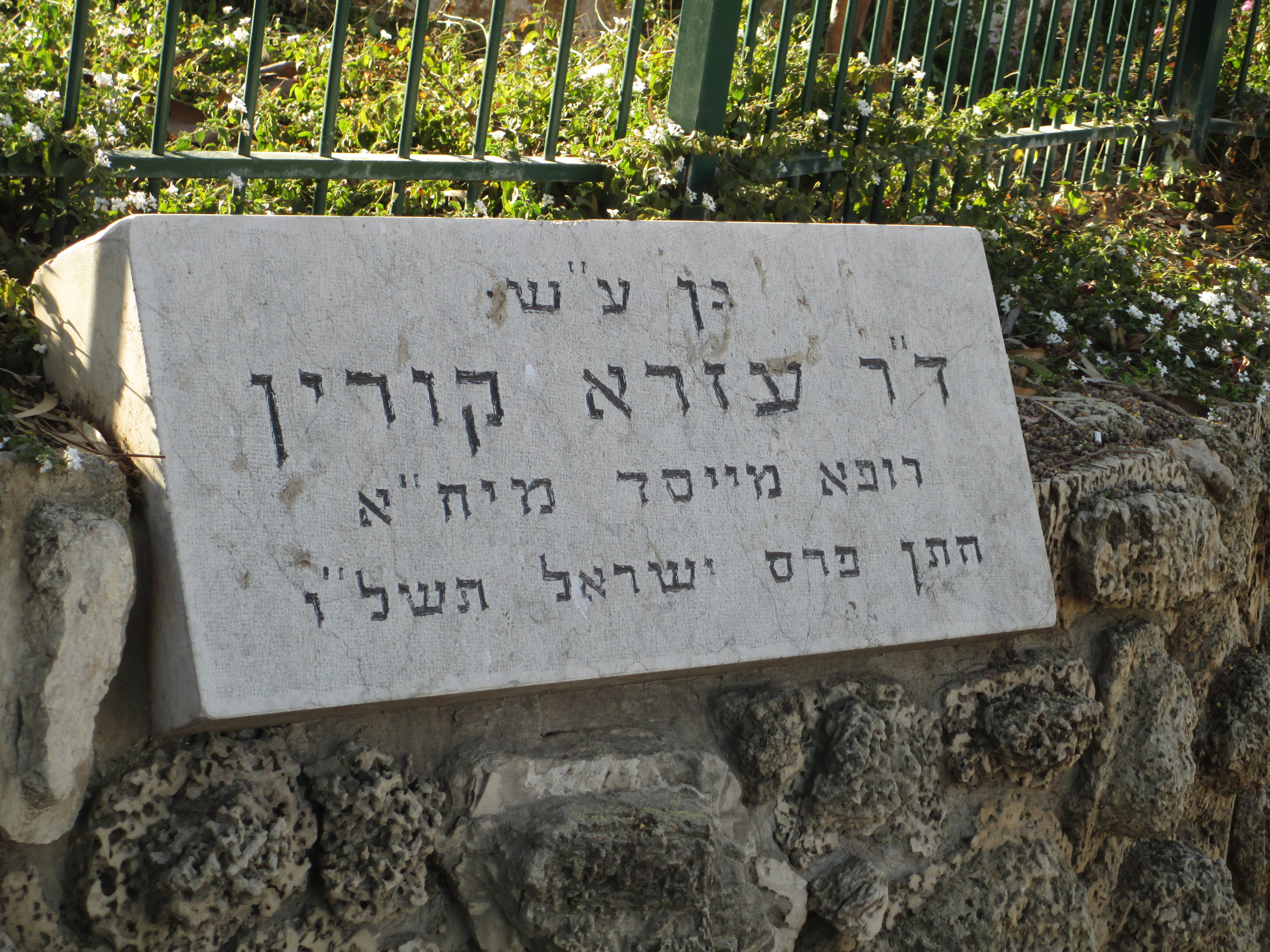 טבלת זיכרון בגן ד"ר עזרא קורין ברמת גן